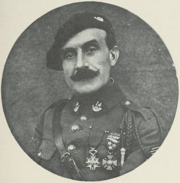 Le Commandant HUMBEL, commandant le 120e BCP entre 11 juillet 1917 et le 11 juin 1918, ici en uniforme du 14e BCA